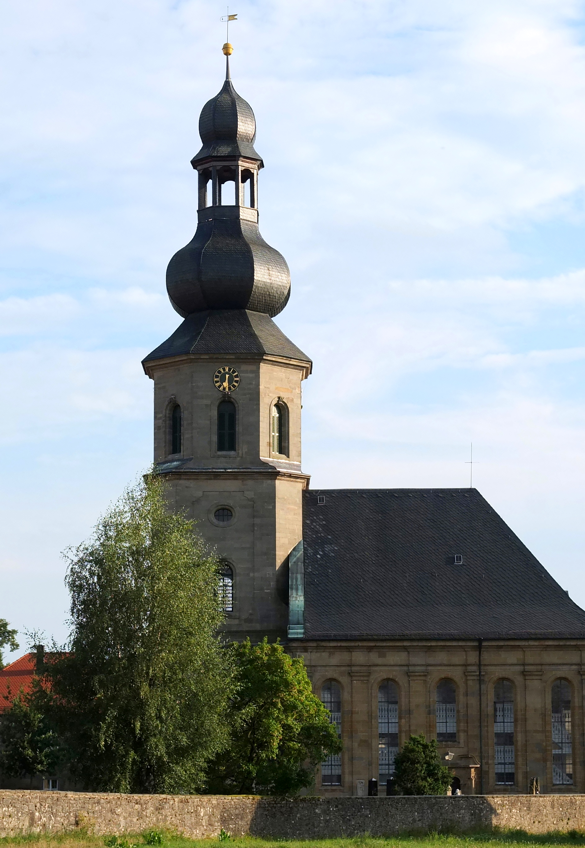 Markgrafenkirche Seibelsdorf, August 2013.